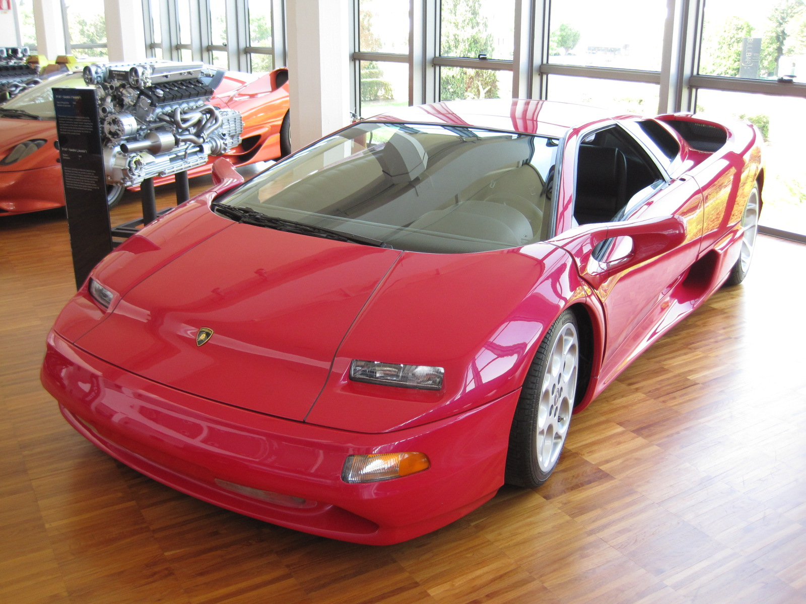 Musée Lamborghini - Prototype P147 Gandini / Acosta - 1997